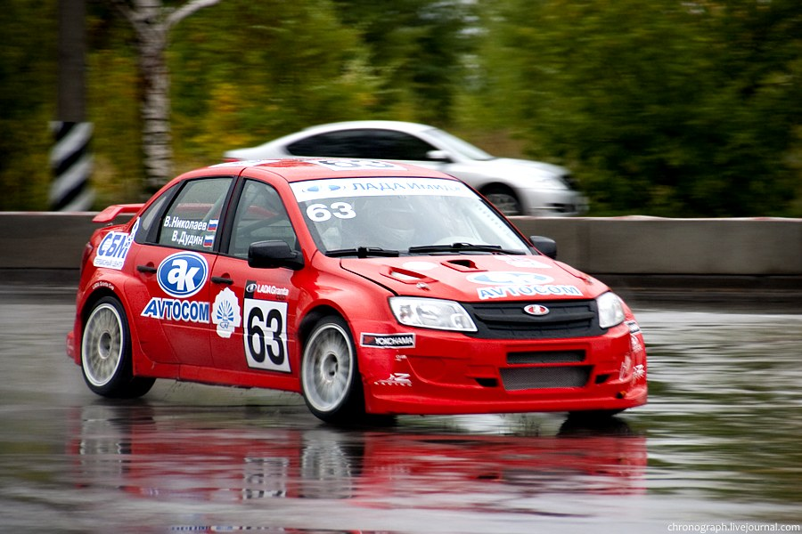 Спортивная Lada Granta. Кубок Lada Granta, Тольятти, Россия